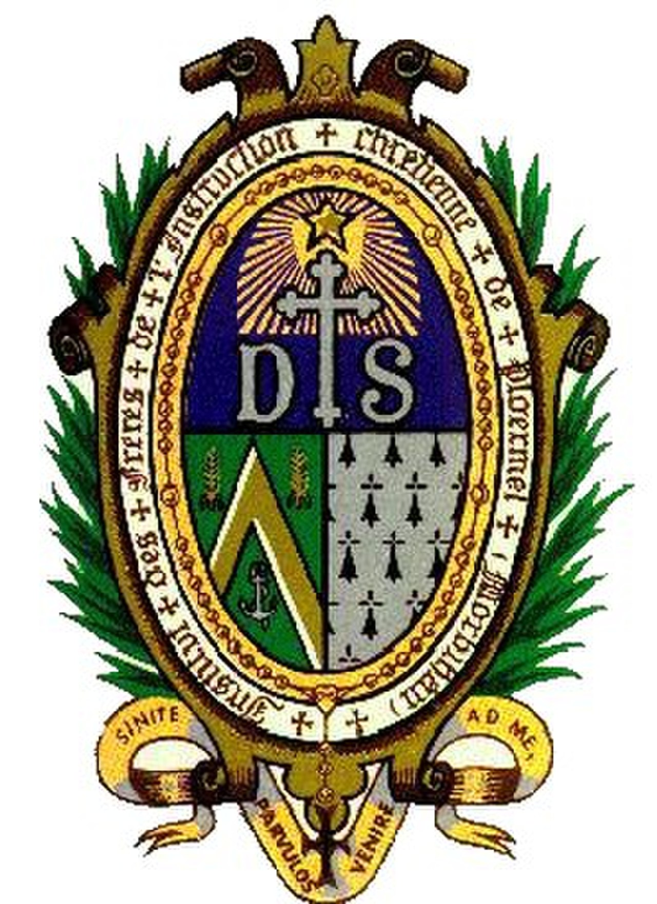 Blason des frères de l'instruction chrétienneEsperanto: Blazono de fratoj de la kristana instruo